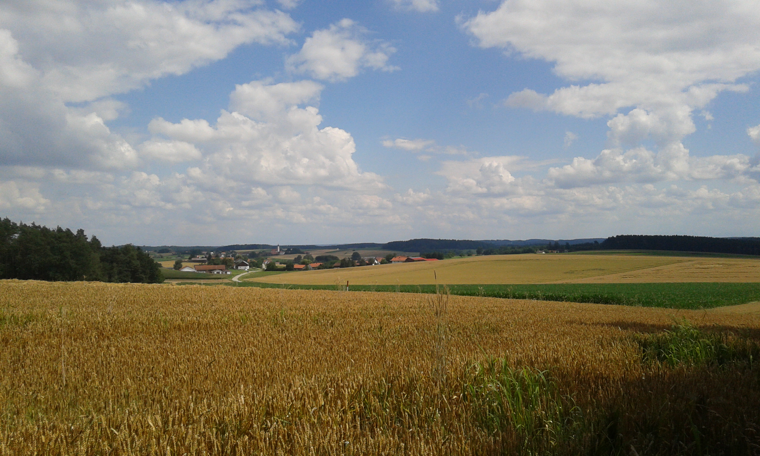 Blick Richtung Süd-Ost